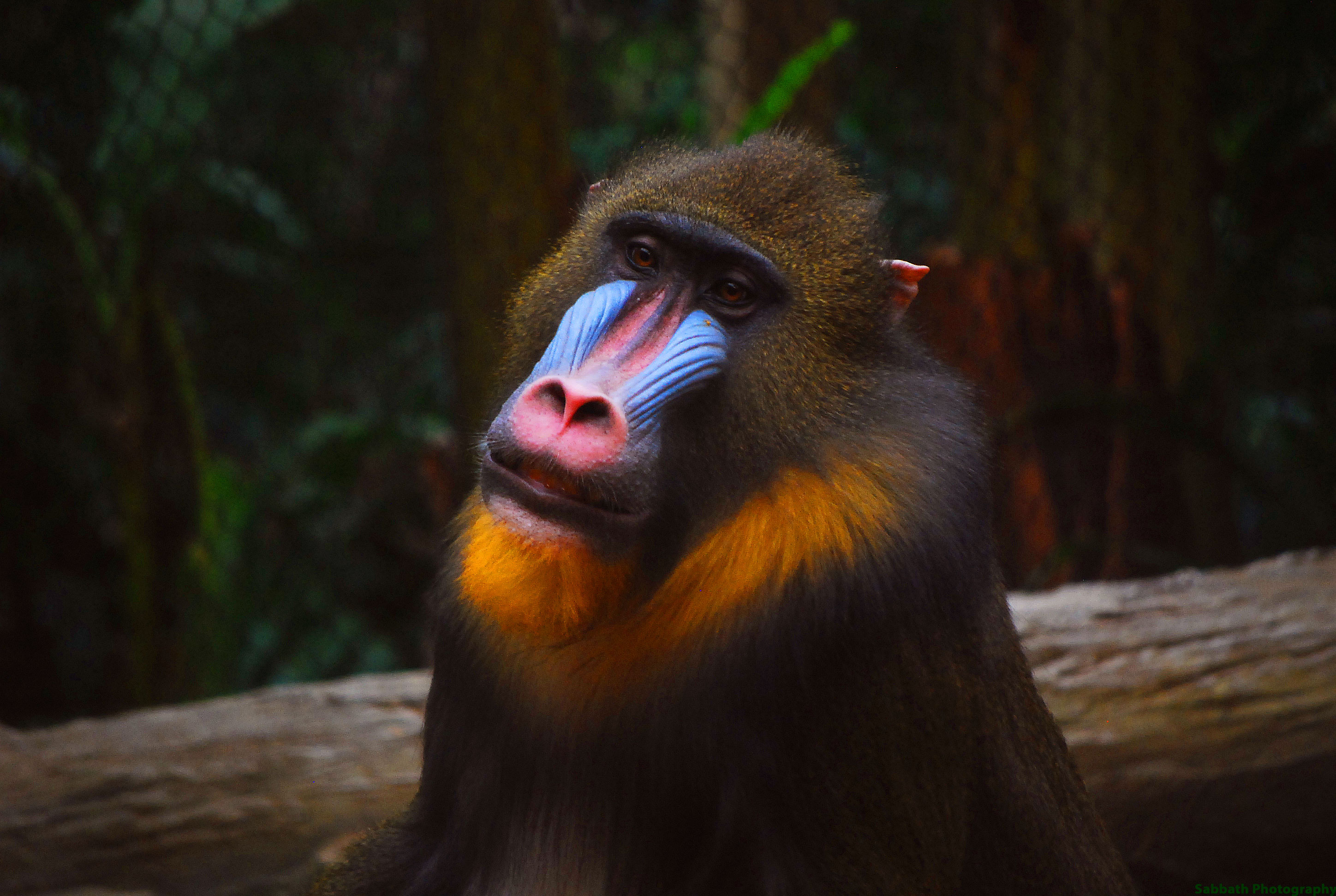 Mandrillus sphinx.